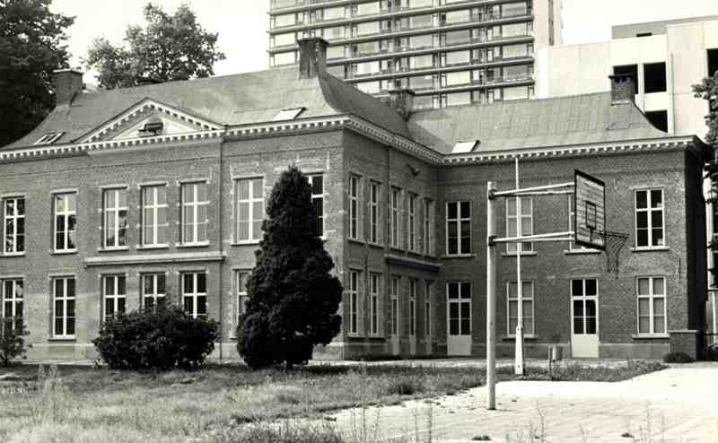 Antwerpen Sint-Bavostraat 2